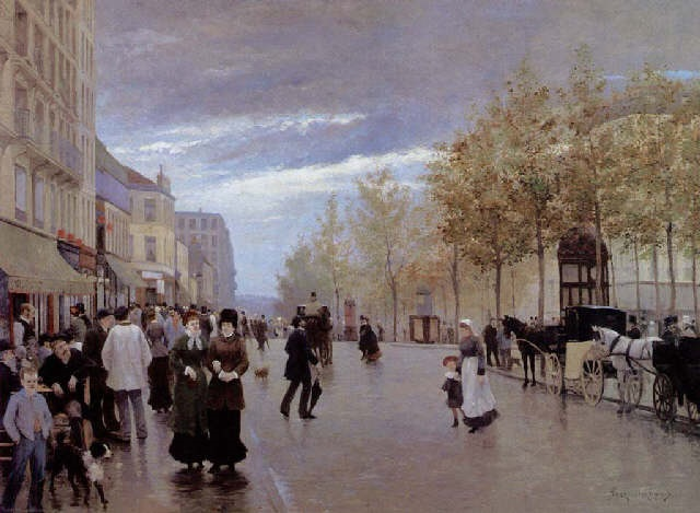 Boulevard de Rochechouart, Paris, oil on Canvas, 107 x 147 cm